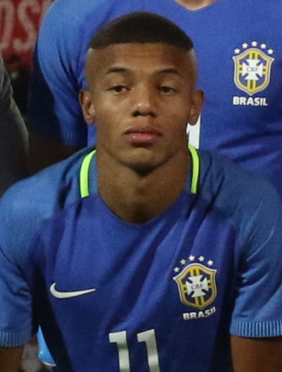 Riobamba, Ecuador, 18 enero 2017 (Andes).- El combinado ecuatoriano dirigido por Javier Rodríguez cayó 1-0 este miércoles ante Brasil en el marco de la primera jornada del Grupo A del Campeonato Sudamericano Sub 20 Ecuador 2017, durante el partido jugado en el estadio Olímpico de Riobamba (centro andino), abarrotado de hinchas. ANDES/Micaela Ayala V.